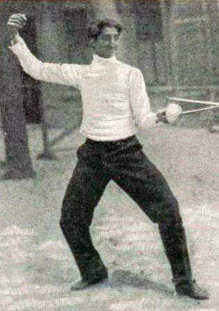 Ramon Fonst, champion olympique à l'épée aux JO de Paris 1900.